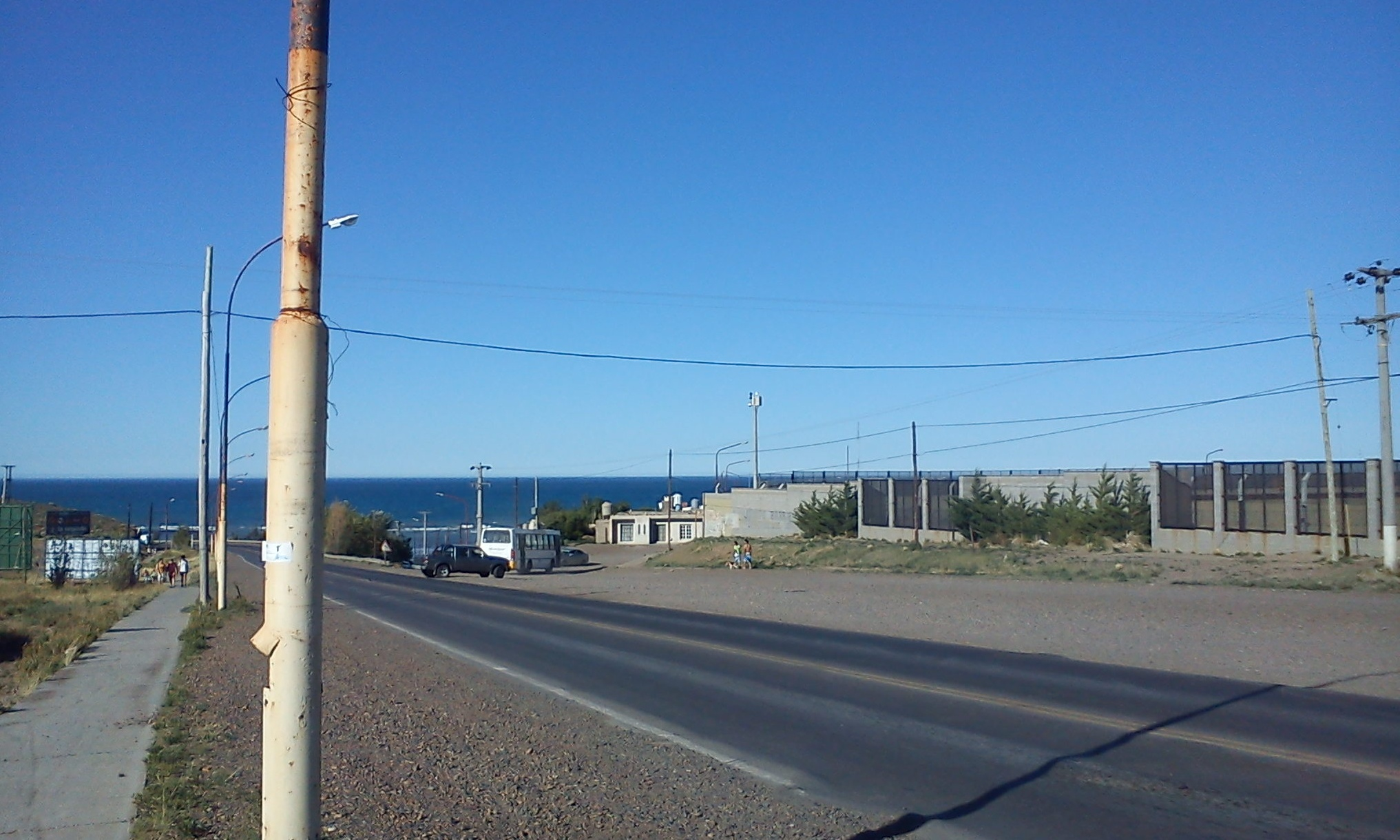 Foto mía, C1 sobre saliendo del Bo. Mar del Plata